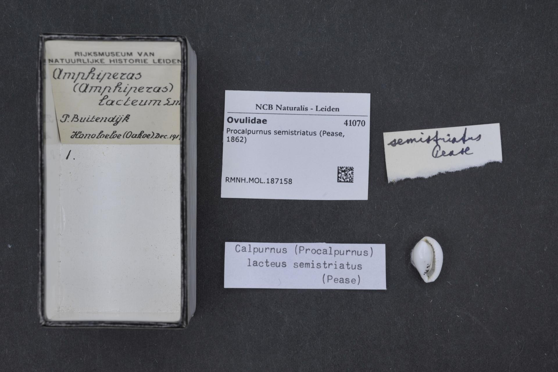 Procalpurnus semistriatus (Pease, 1862)